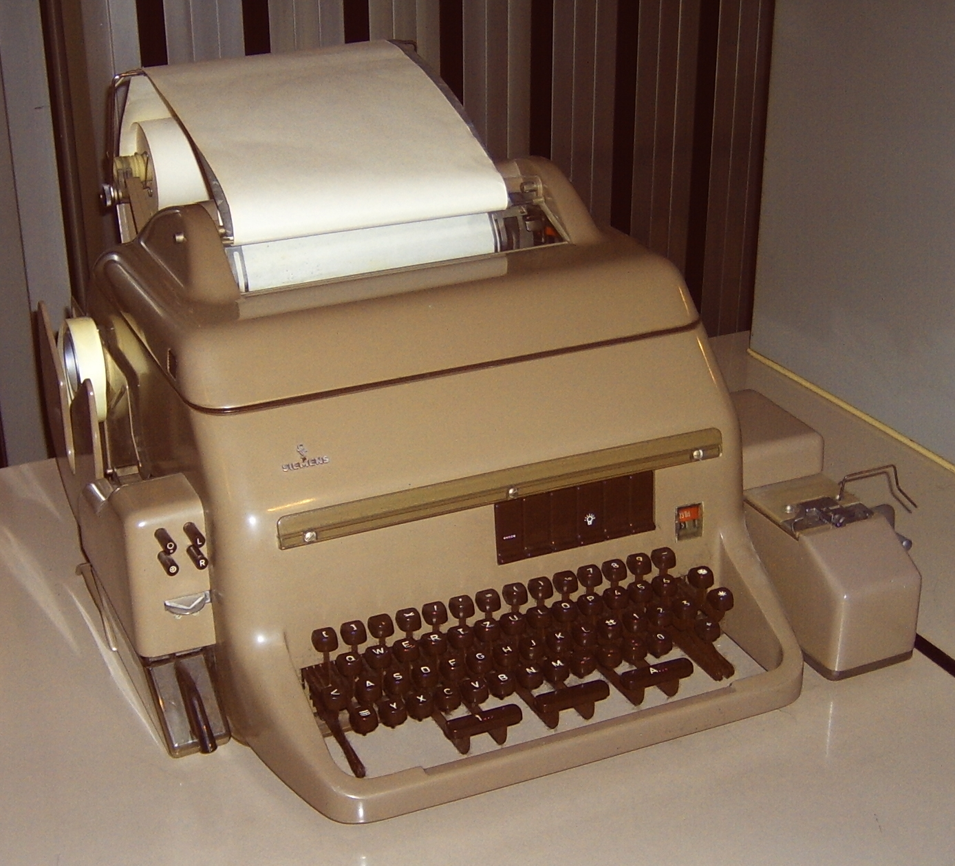 Stolni model dálnopisu T100, který je modulární a rozšířitelný. Na levé straně je (volitelný) děrovač pětistopé pásky se zásobníkem, na pravé straně její čtečka, která umožňuje přenos předem připravených zpráv plnou rychlostí. Na vlastním přístroji nad počítadlem doby provozu je červený přepínač rychlosti přenosu, na kterém lze rozeznat rychlost 75 Bd. Vlevo a vpravo od mezerníku jsou přepínače "číslice" (1) a "písmena" (A) jako u psacího stroje, aby se do 5 bitů (32 možností) dalo zakódovat obojí. Papír je nekonečná role, patrně s karbonovým kopírákem.